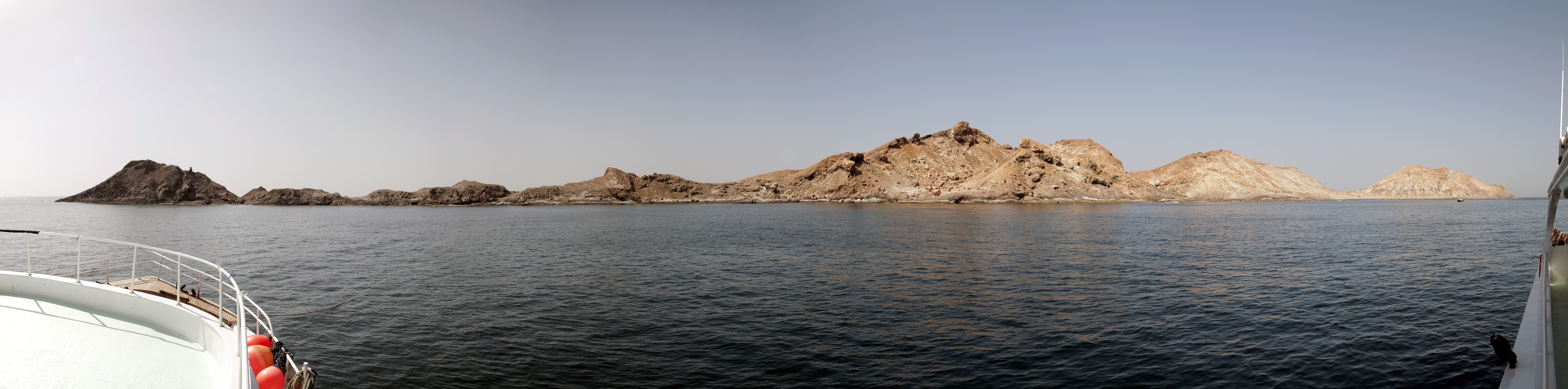 Al Qibliya